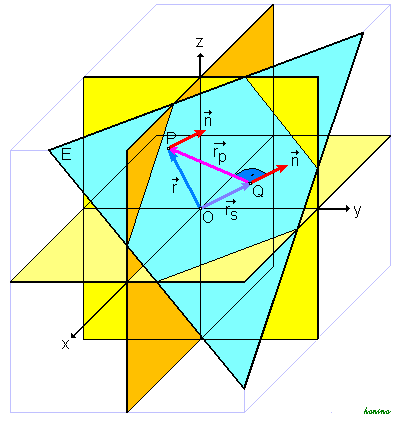 Zur Normalform der Ebenengleichung